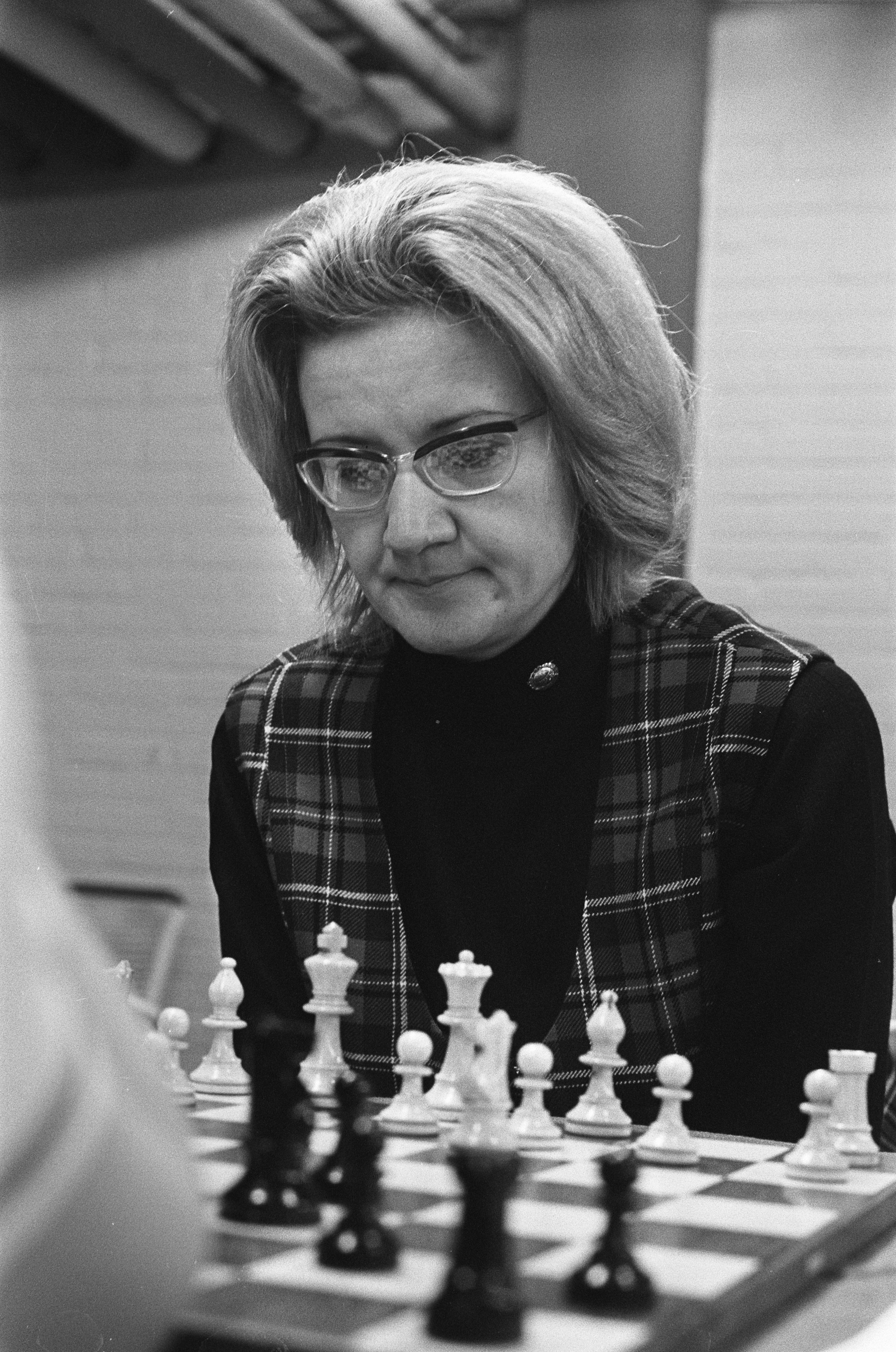 Collectie / Archief : Fotocollectie Anefo Reportage / Serie : [ onbekend ] Beschrijving : Hoogovenschaaktoernooi, mevrouw Ljubica Zivkovic Datum : 25 januari 1973 Trefwoorden : schaken, toernooien Instellingsnaam : Hoogovenschaaktoernooi Fotograaf : Verhoeff, Bert / Anefo Auteursrechthebbende : Nationaal Archief Materiaalsoort : Negatief (zwart/wit) Nummer archiefinventaris : bekijk toegang 2.24.01.05 Bestanddeelnummer : 926-1803